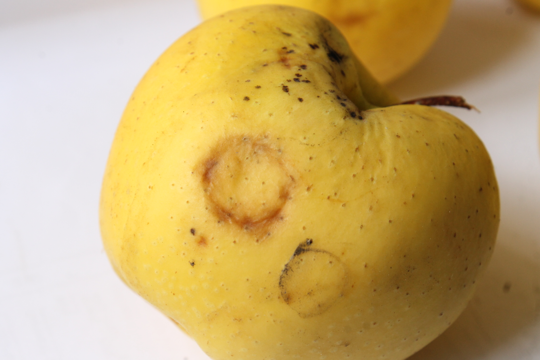 Apple chlorotic leafspot virus, Odrůda Golden Delicious. Chlorotická skvrnitost jabloně (ACLSV - Apple chlorotic leafspot virus) je virová choroba přenášená při vegetativním množení ovocných dřevin, především ve školkách. Virus napadá široký okruh hostitelů a projevy je podobný symptomům viru šarky. Příznaky se projevují především na citlivých rostlinách jabloně odrůdy 'Golden Delicious'.